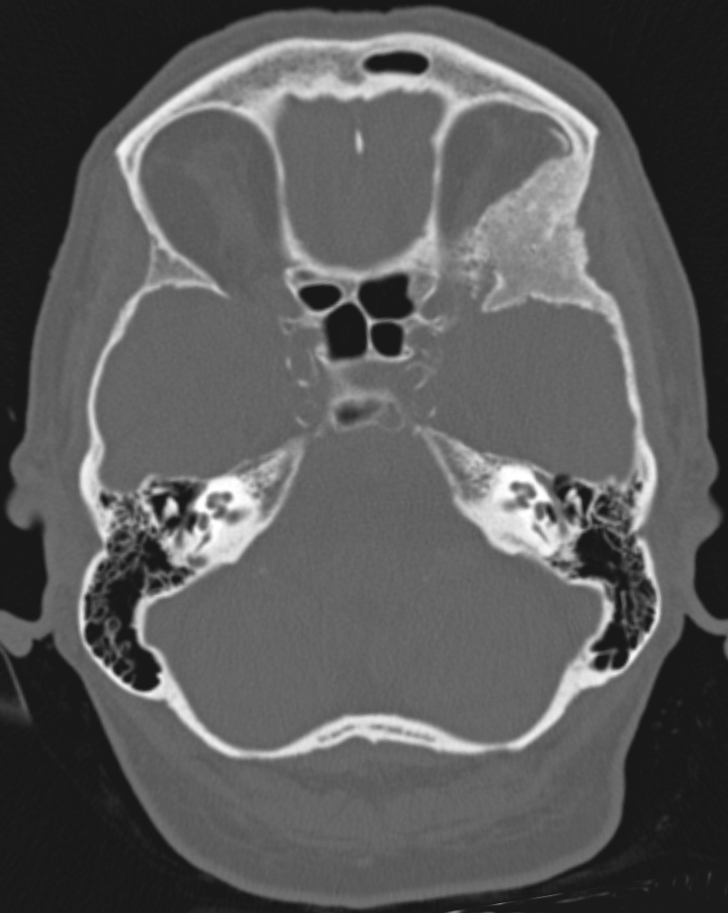 Keilbeinmeningeom in der Computertomographie und Magnetresonanztomographie. Deutliche, homogene Kontrastmittelaufnahme mit 'dural tail' (sagittal gut zu sehen). In der Computertomographie (Knochenfenster und VRT) ist die reaktive Hyperostose besonders gut zu erkennen, die durch die Vorwölbung in die Orbita schon einen Bulbustiefstand bewirkte. Computertomographie axial.